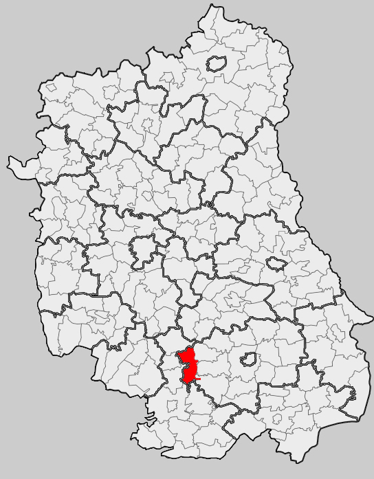 Map of gmina Radecznica, Zamość county, Lublin voivodship Mapa gminy Radecznica, powiat zamojski, województwo lubelskie